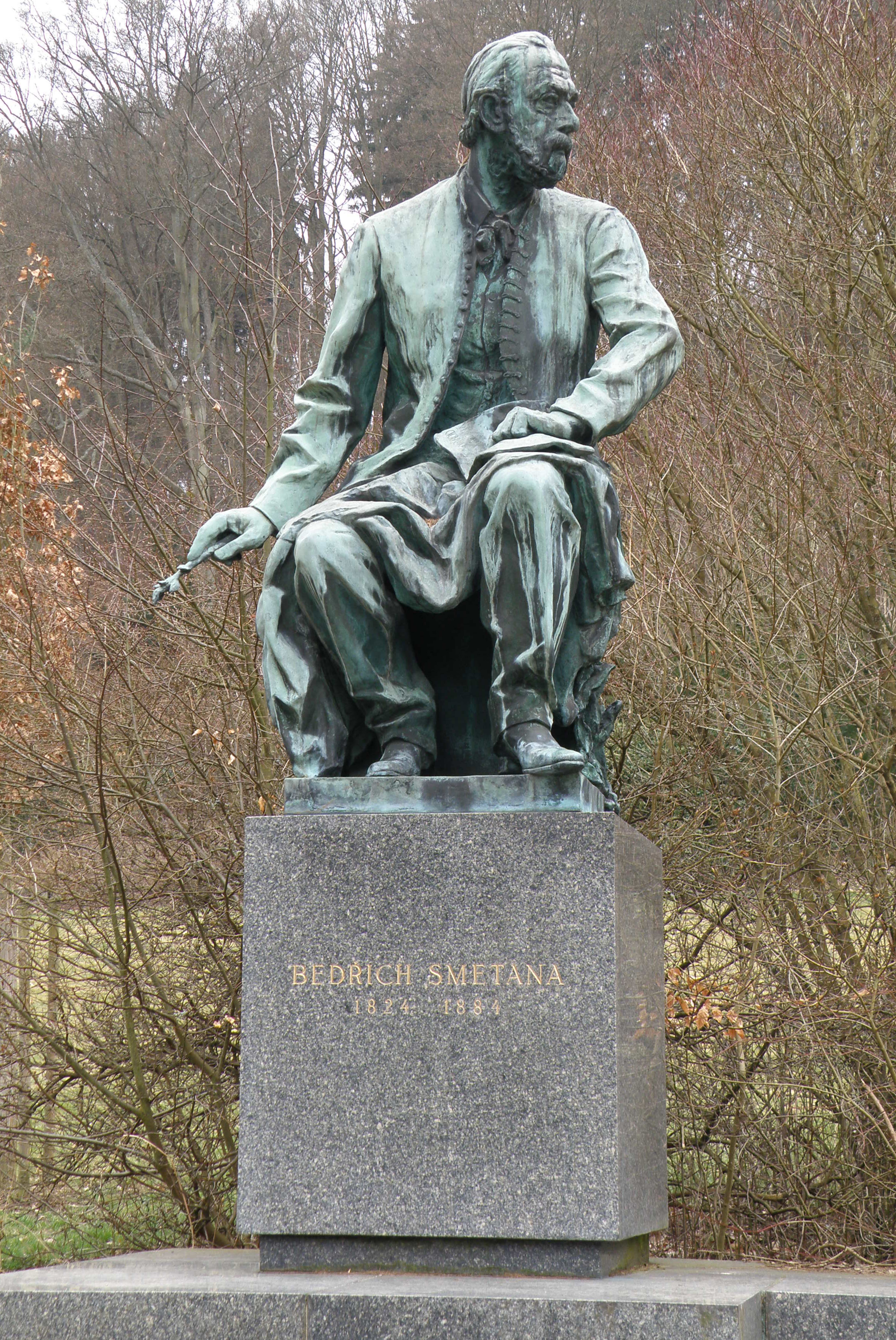 Pomník Bedřicha Smetany, v parku severně od Poštovního dvora, parc. 786/1, Karlovy Vary.